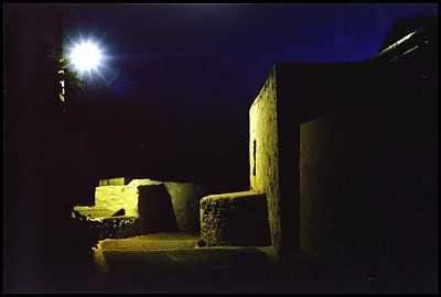 Griechisches Dorf bei Nacht - Ägäis (Kykladen), Griechenland, 80er Jahre - Langzeitbelichtung, Aufnahme mit Minolta 9000 - Fotografie von Agon S. Buchholz. Diese Abbildung wird der Wikipedia unter der GNU FDL zur Verfügung gestellt.